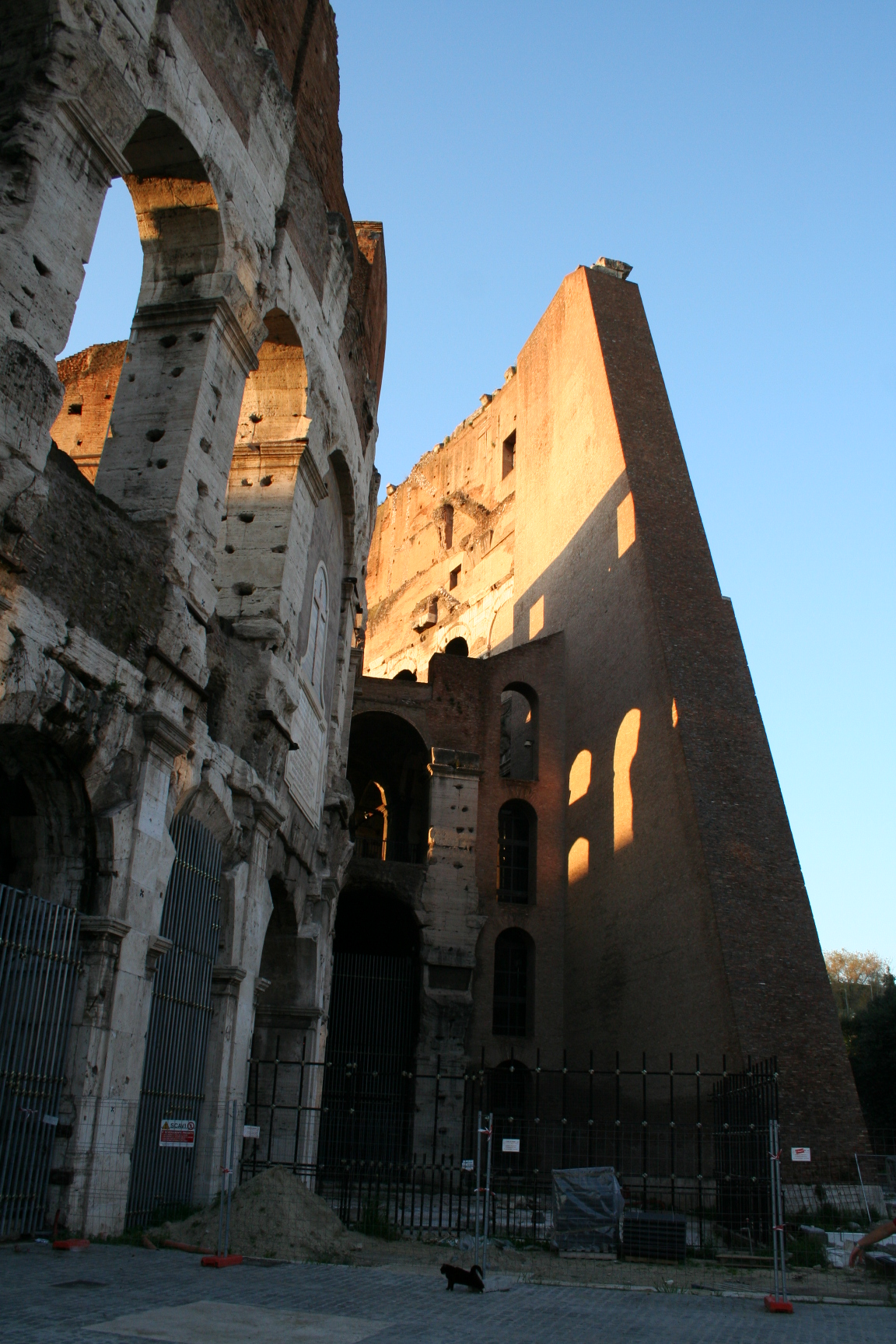 Sperone in laterizio aggiunto da Stern